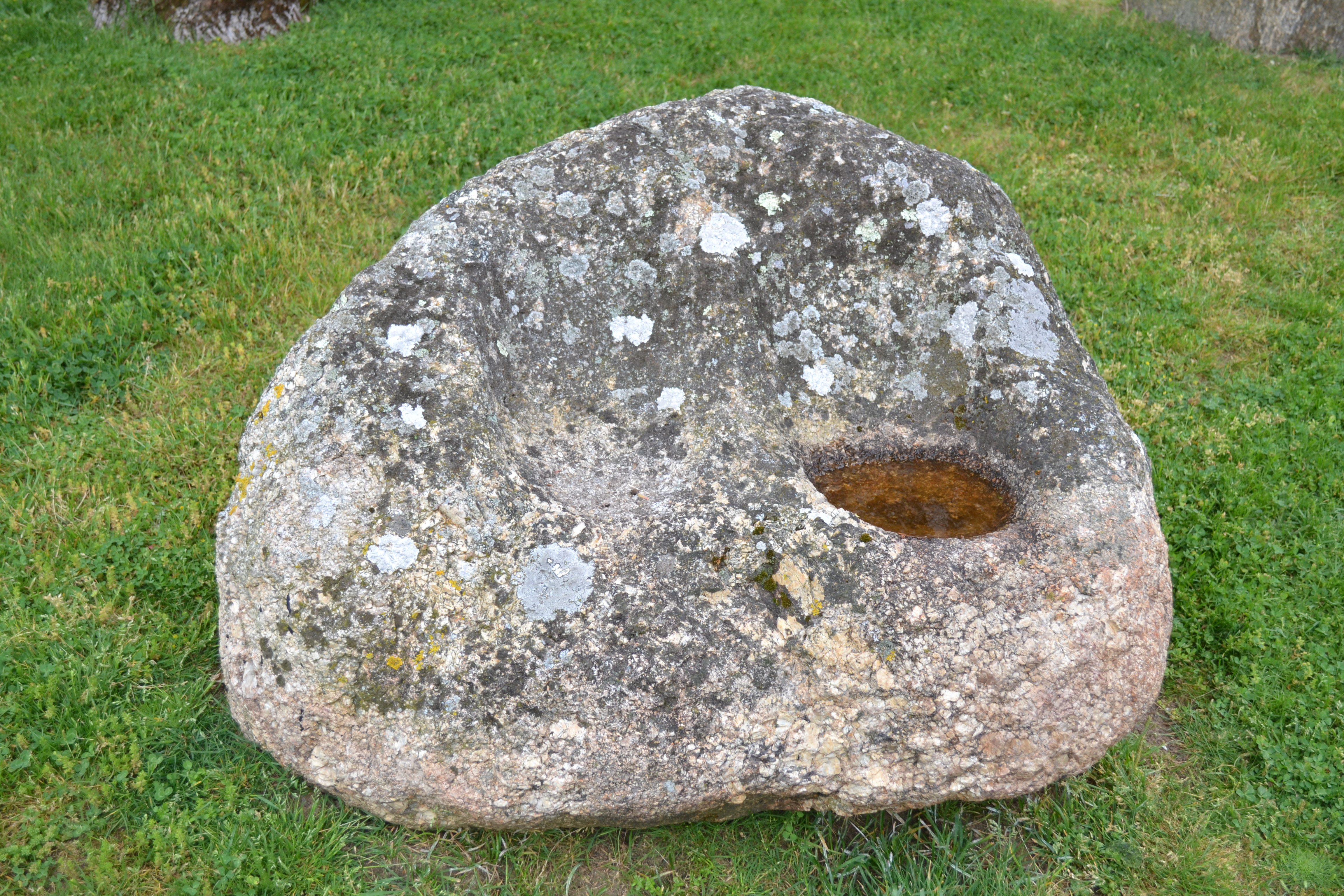 Pierre dite des Fesses-du-Diable, devant la mairie.